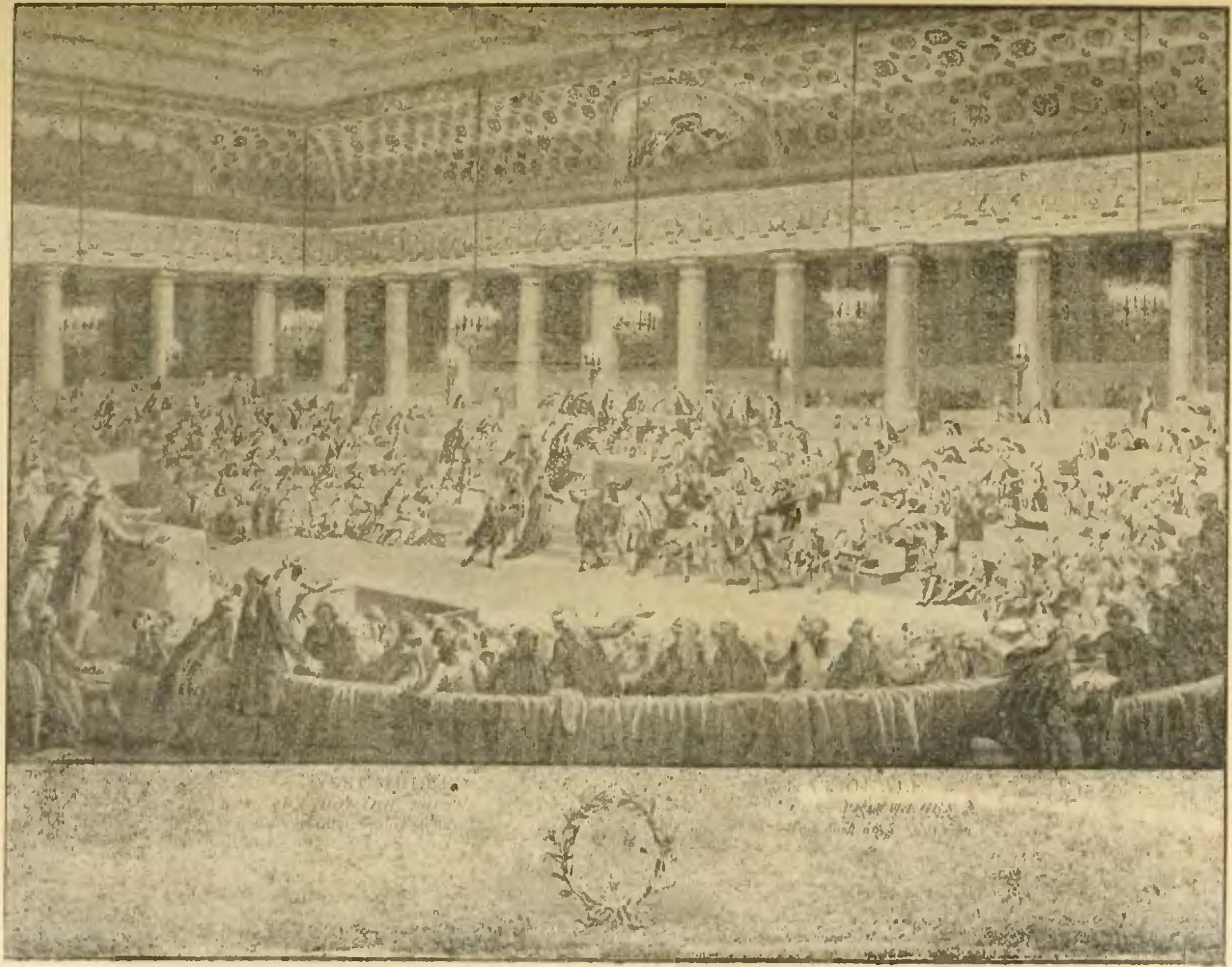 Estampe représentant la nuit du 4 août 1789 dans l'Histoire socialiste de la France contemporaine (tome I).